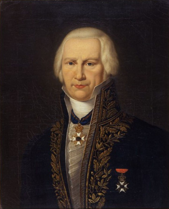 Petrus Hofstede (1755-1839) gouverneur van Drenthe